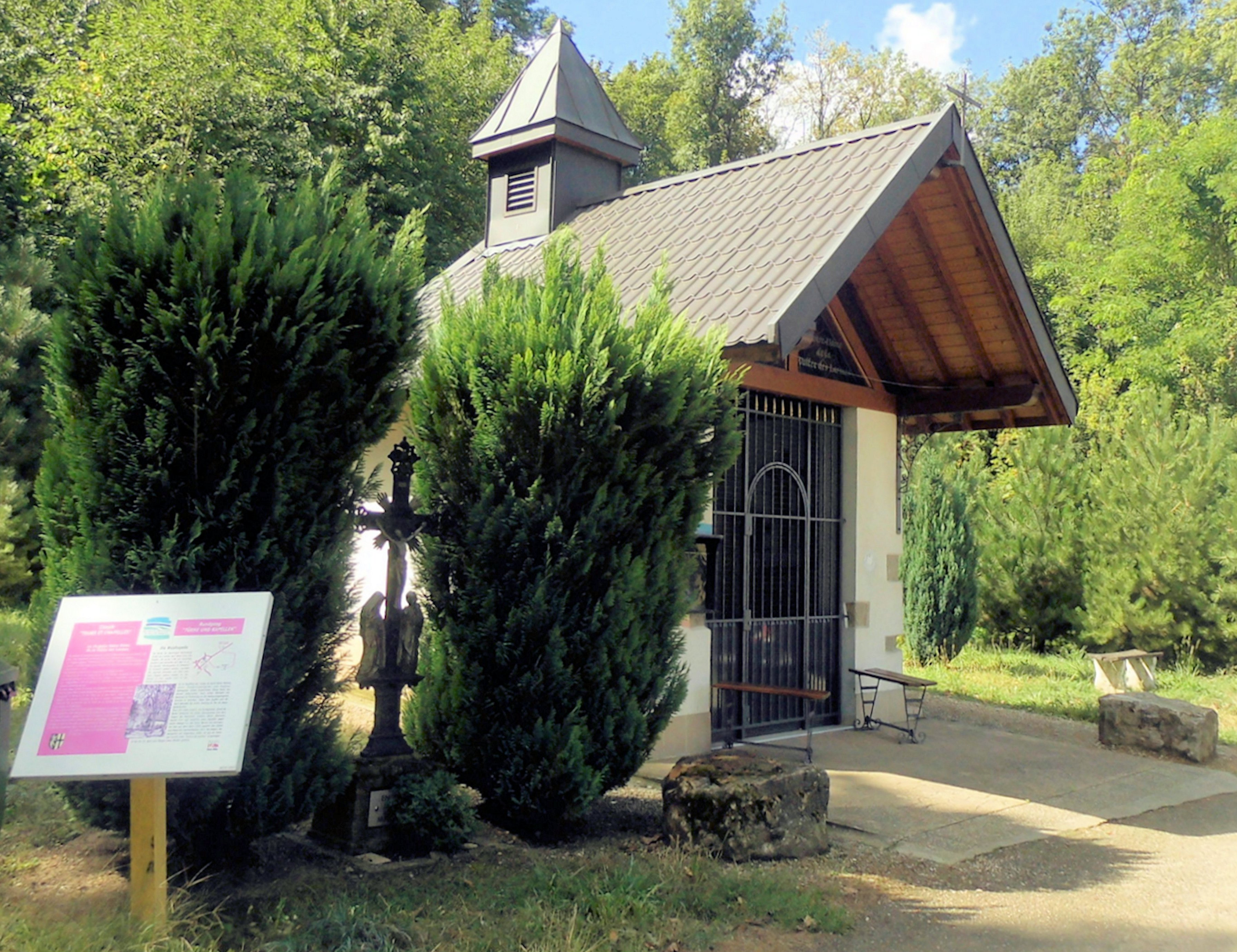 La chapelle Notre-Dame de la Vallée des Larmes à Schlierbach